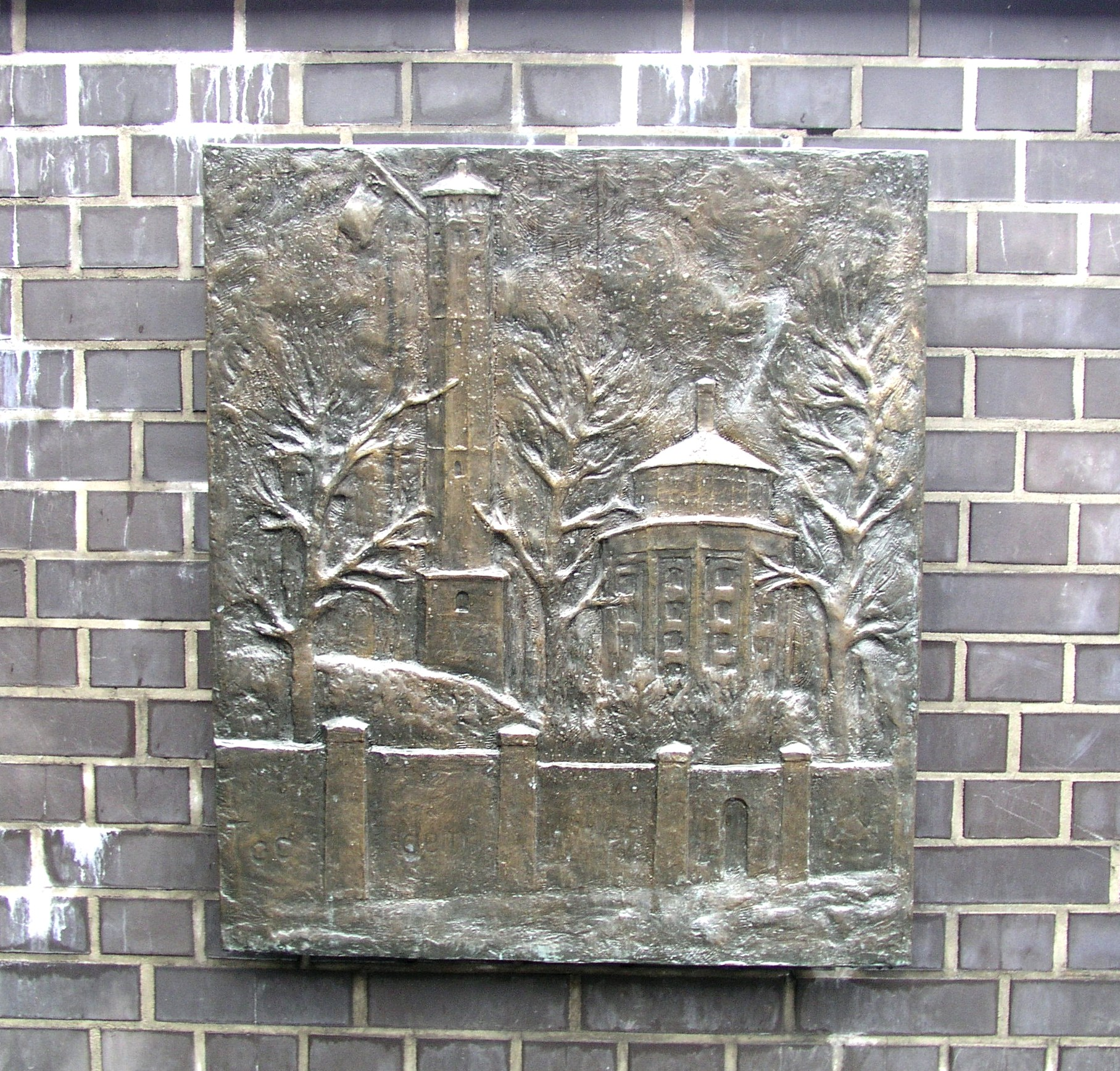 Gedenktafelserie (Teil 3) in der Schönhauser Allee, Berlin, von Günter Schütz, 1985/86